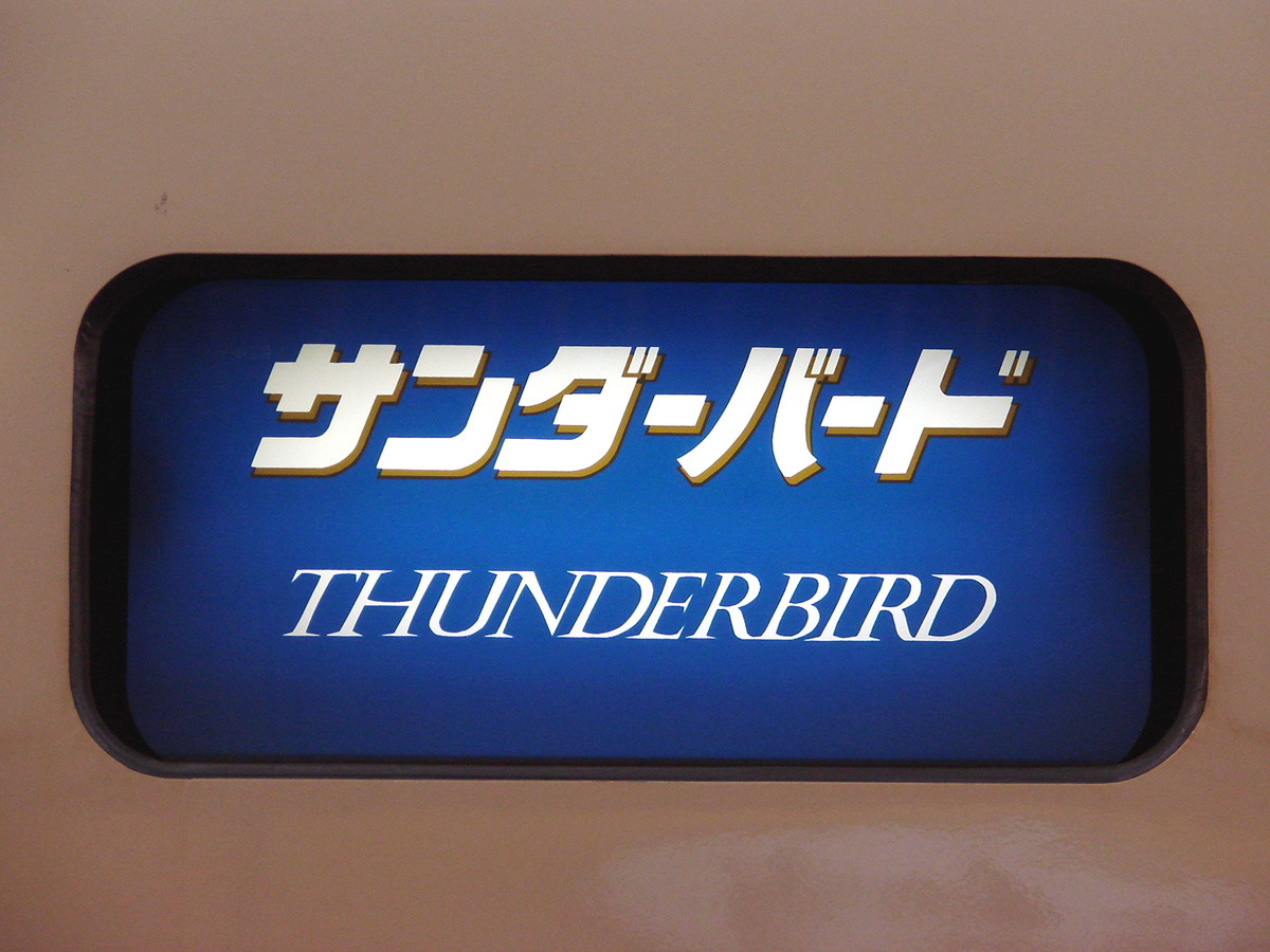 サンダーバード ロゴマーク